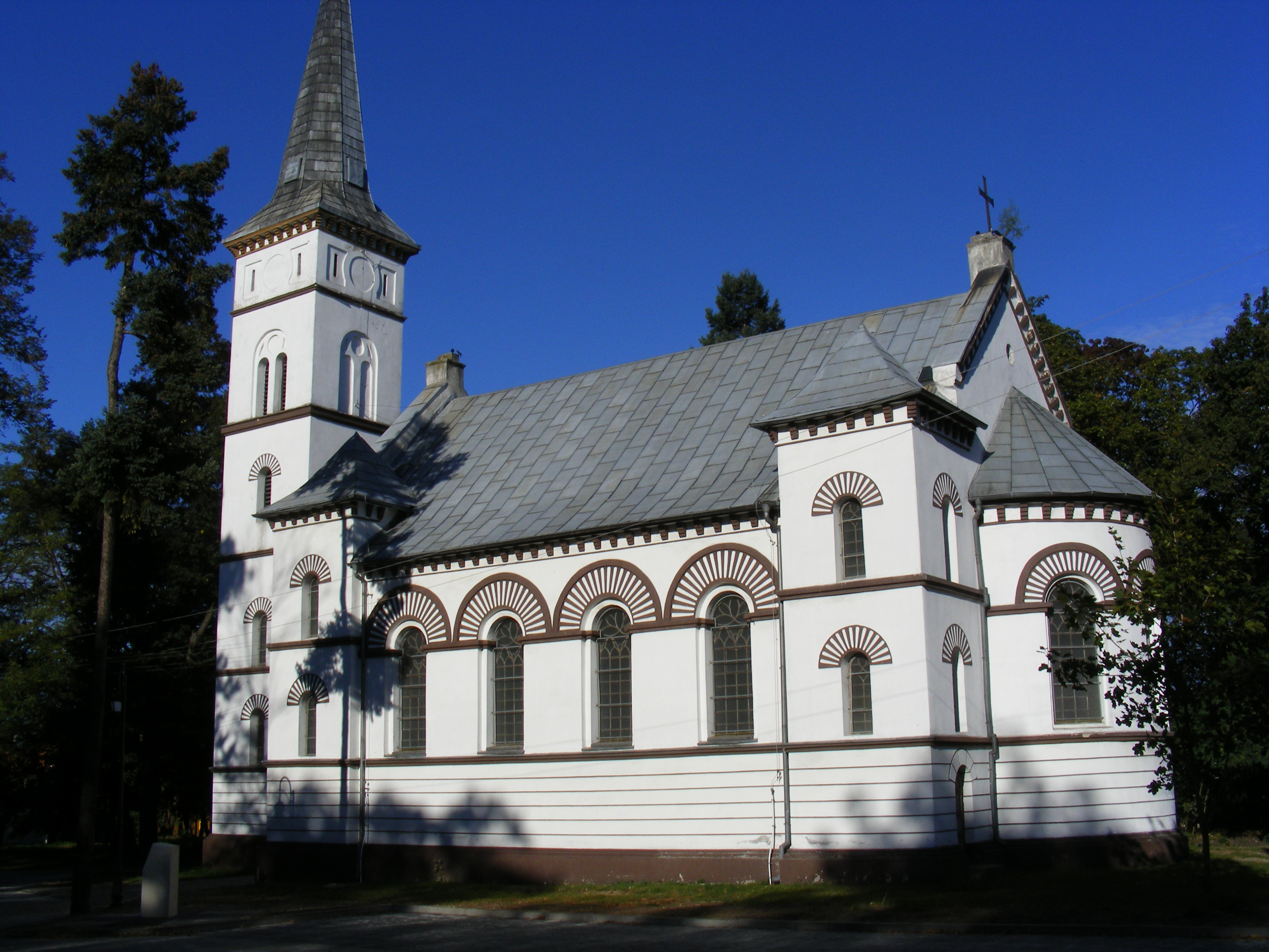 Kościół Ewangelicki w Ozimku woj. opolskie. Widok od strony cmentarza. Nr zabytku 1177/66